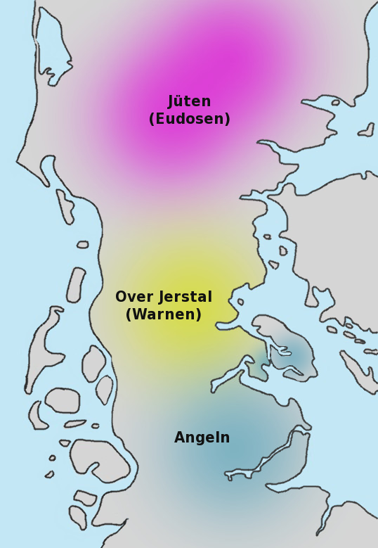 Stammesgebiete des Over Jerstal-Kreises, der Angeln und der Jüten um etwa 100 n. Chr. nach Vorlage: Sønderjyllands historie, Seite 290, Aabenraa 2011